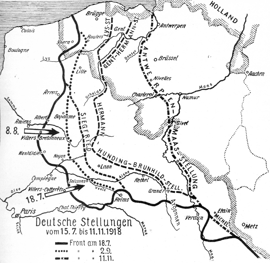 Karte: Deutsche Stellungen Juni bis November 1918 an der Westfront